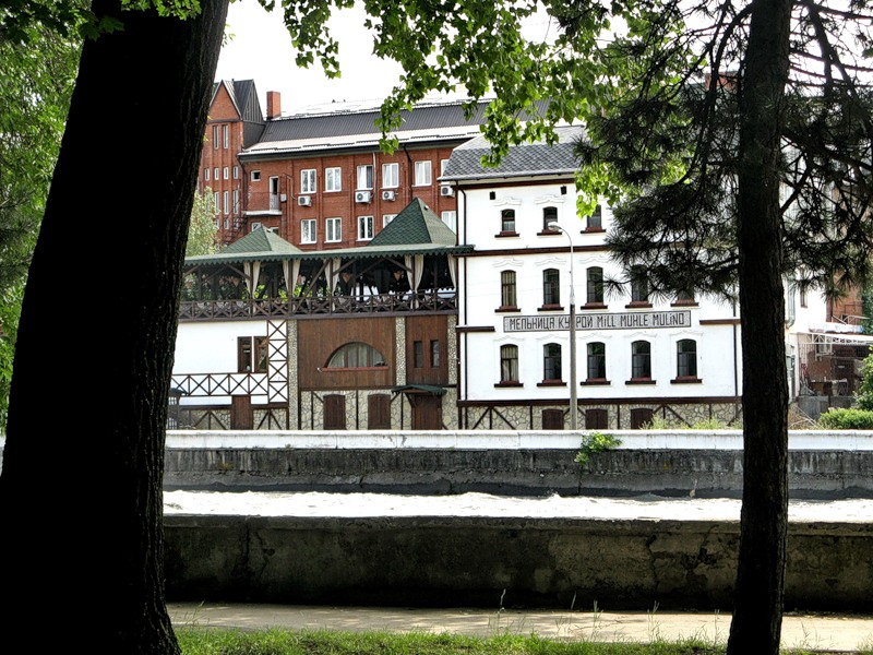 Restoracio „Muelilo“ ĉe la rivero Terek en Vladikavkaz, vido de la alia bordo de la rivero, el la Centra Parko.